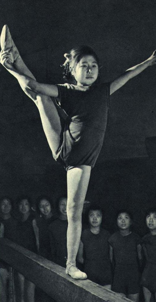 1962-01 1962年 体操平衡木